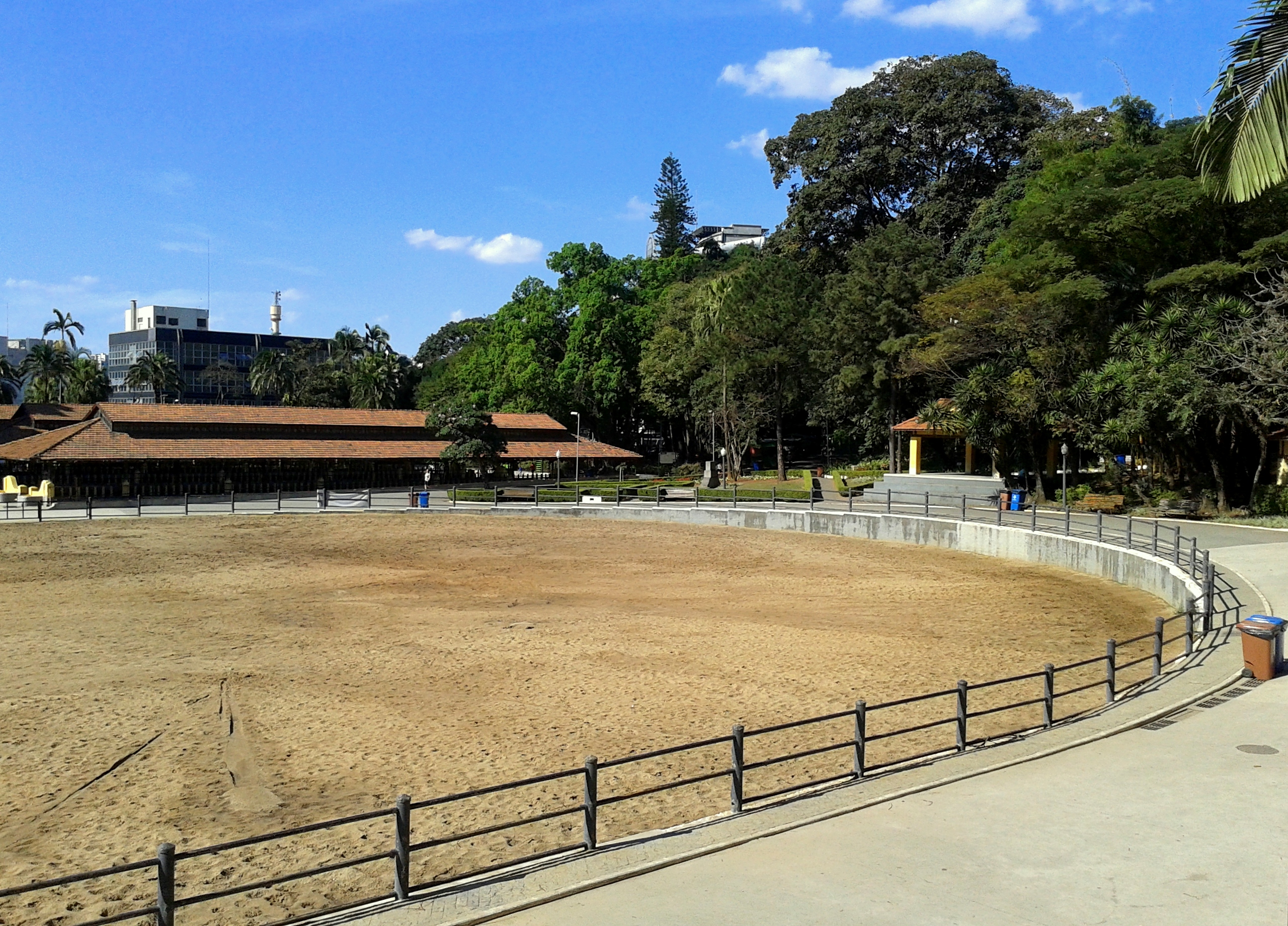 Arena do Parque da Água Branca. São Paulo, SP, Brasil.